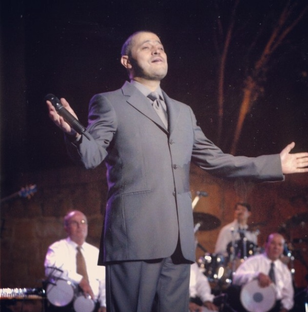 المطرب جورج وسوف